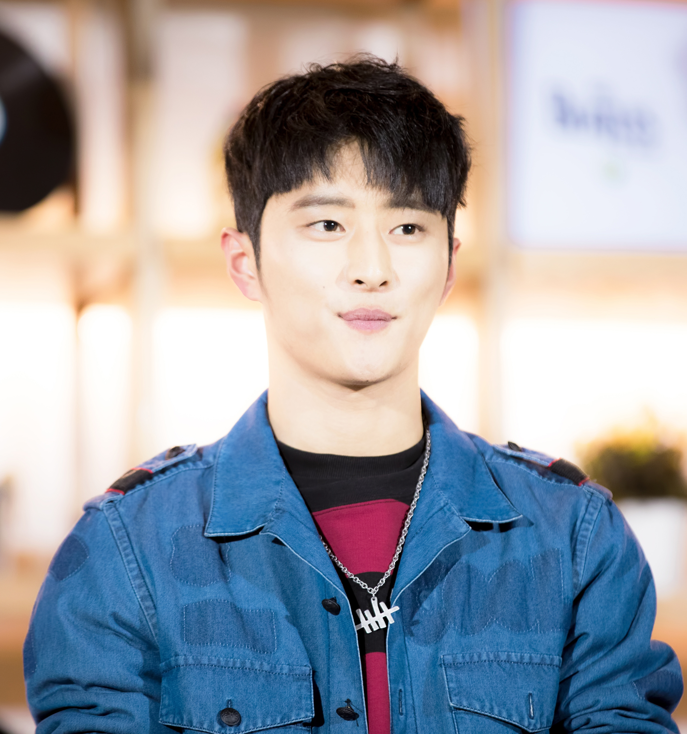 161217 상암 SOUND-K 달콤콘서트 제이셉 4pic